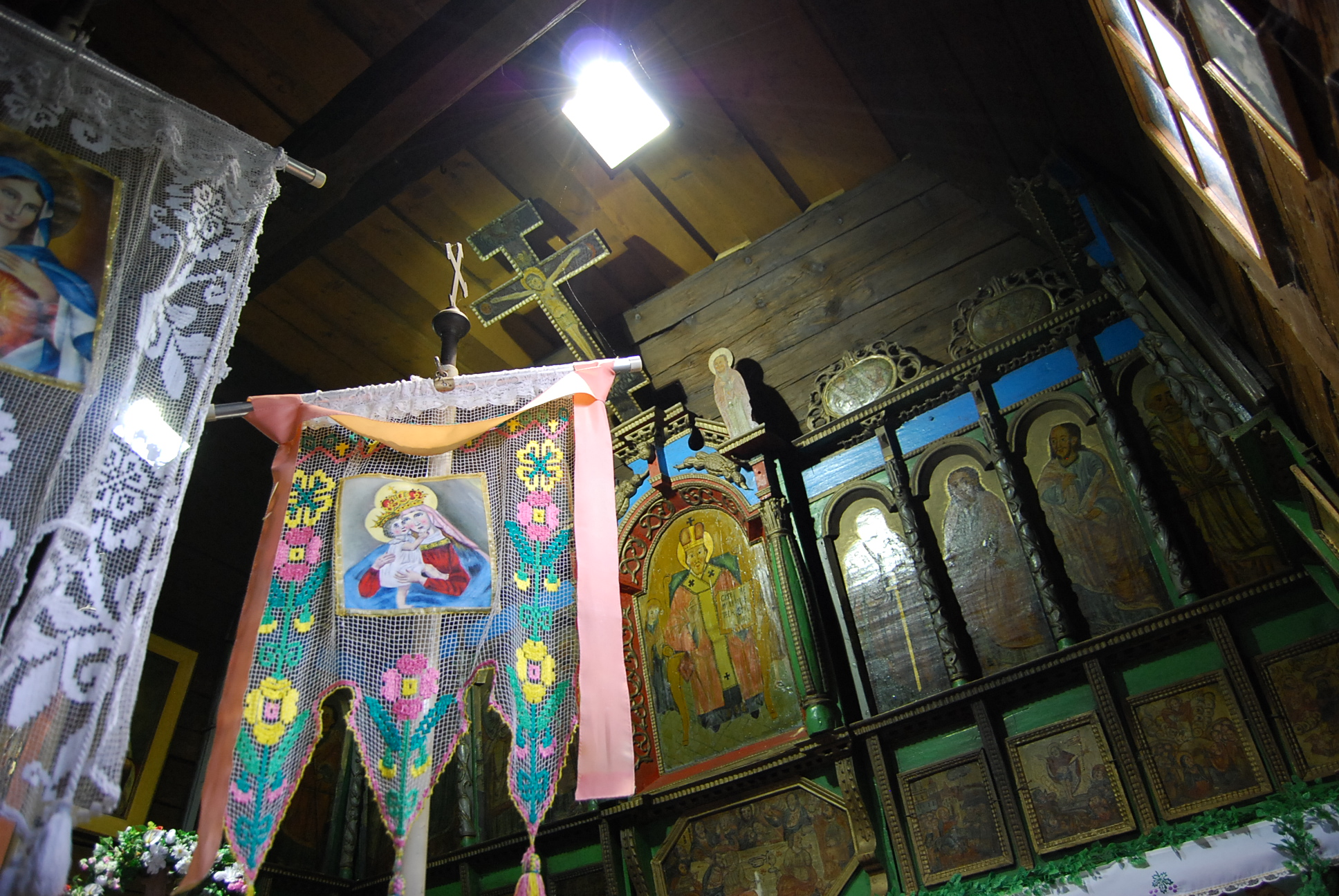 Görögkatolikus Szent Mihály-templom, Oroszpatak (Ruský Potok), Szlovákia